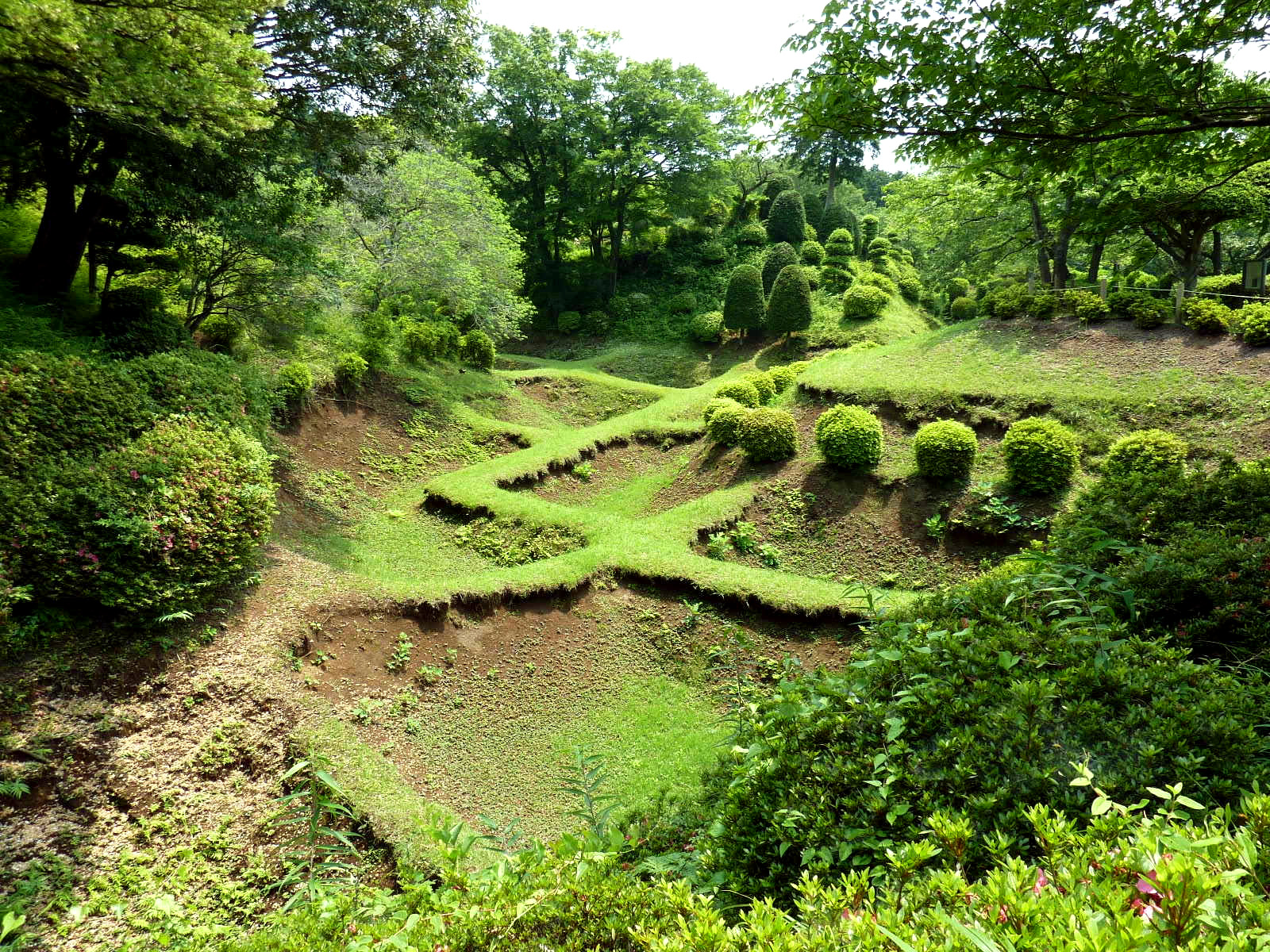 山中城（障子掘）;西ノ丸付近より撮影 ;2009/6/13撮影 ; Mocchy 山中城（障子掘）